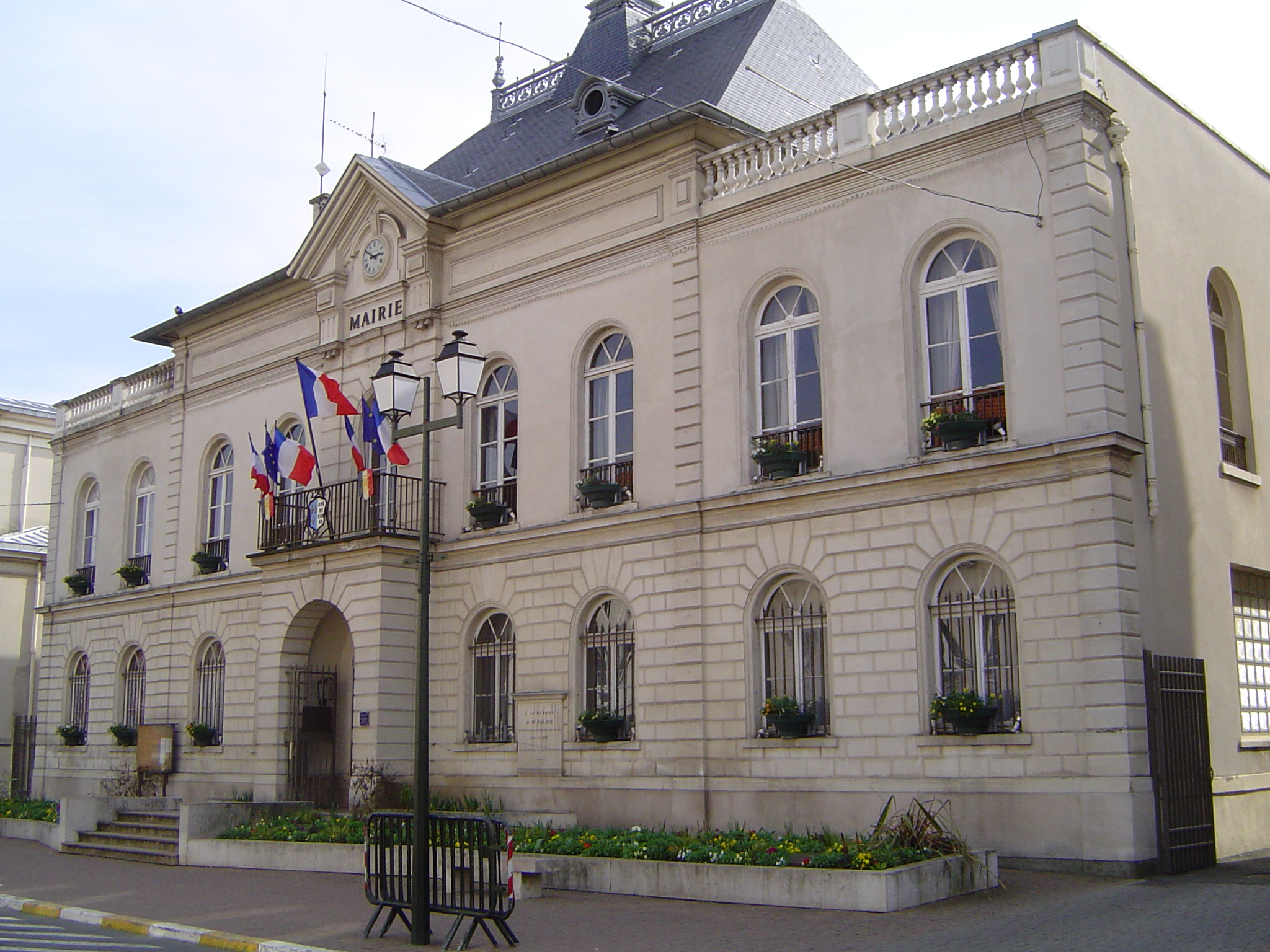 Photos prises à Bourg-la-Reine, commune française des Hauts-de-Seine